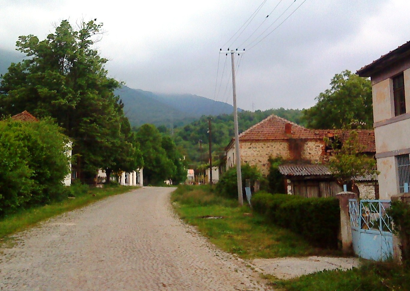 Патот Битола - Ресен Р-106 низ с.Кажани